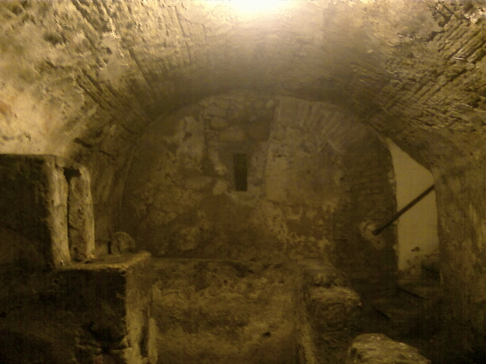 Aspreno al Porto:Hypogeum